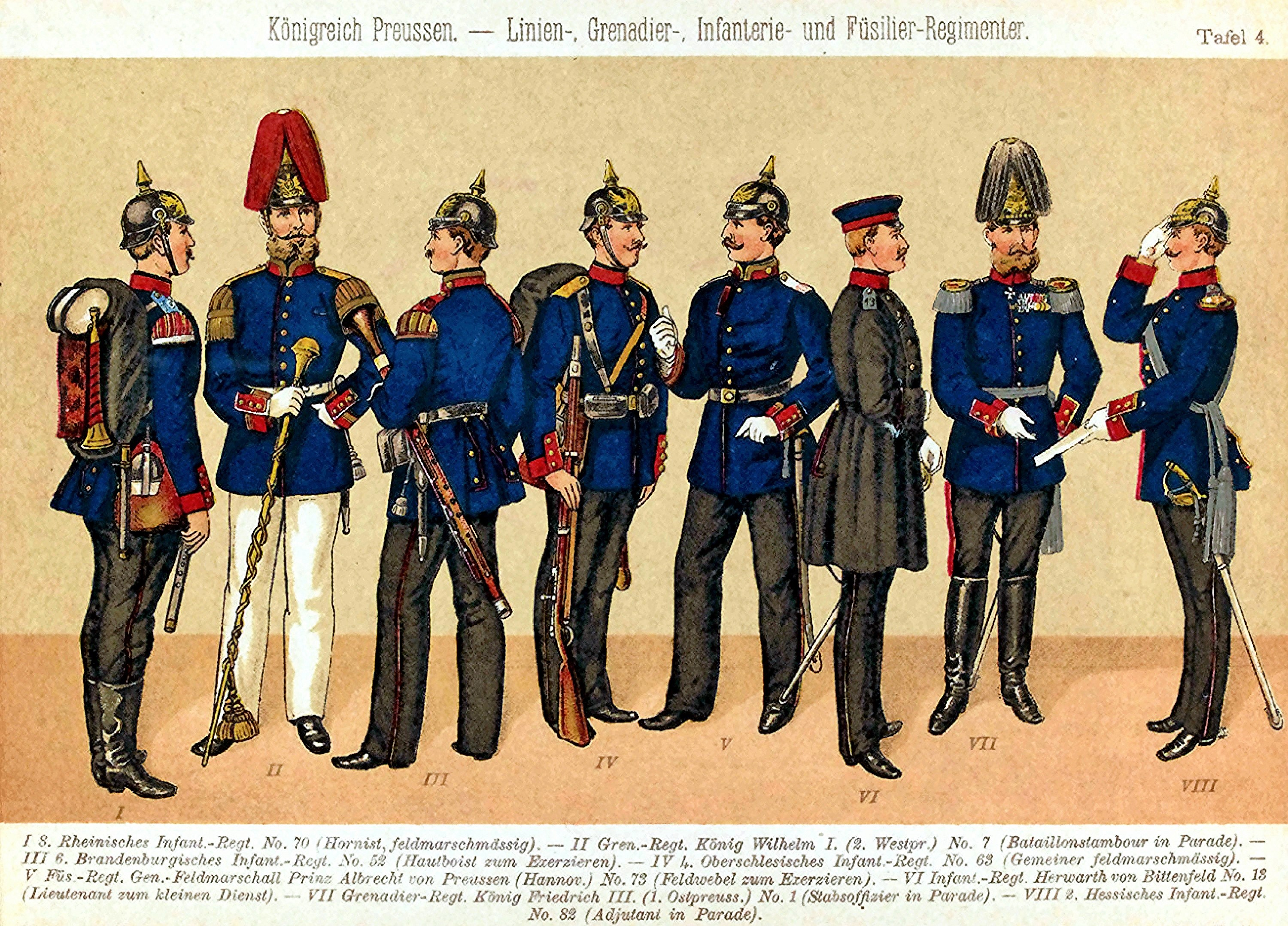 Preußische Uniformen